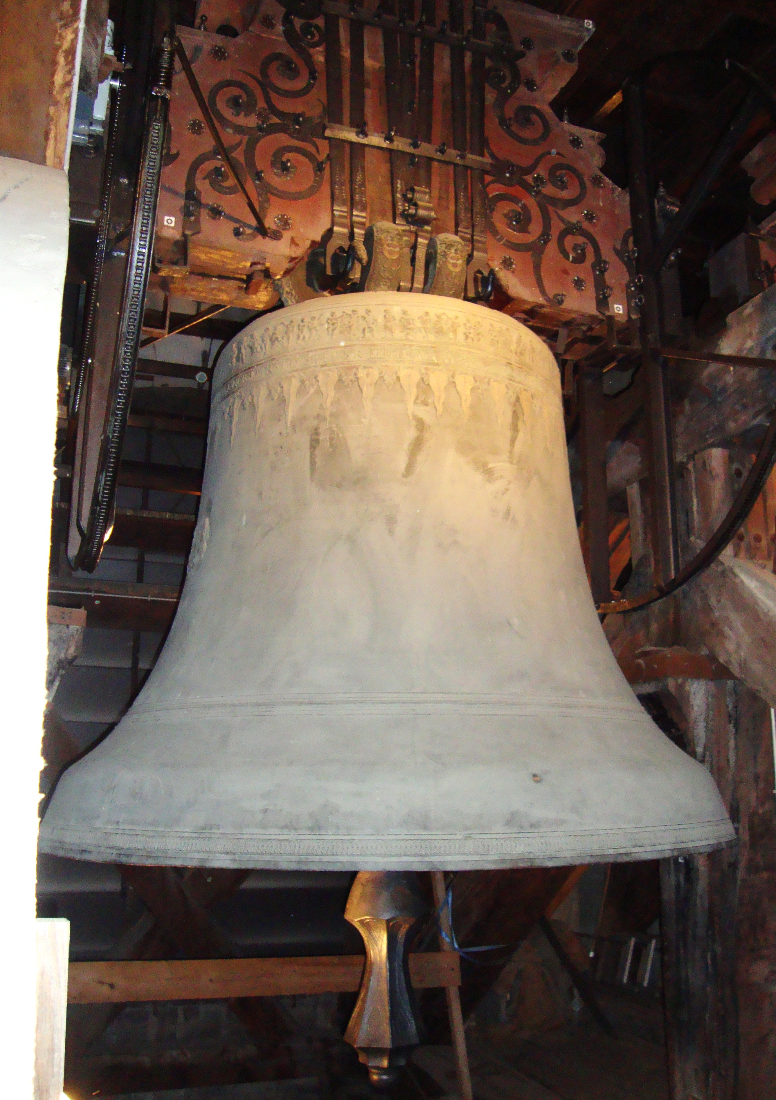 Grosse Glocke am Berner Münster: e° Grosse Glocke, ca. 9500 kg, 1611, Abraham Zender, Bern / Peter VII. Füssli, Zürich.